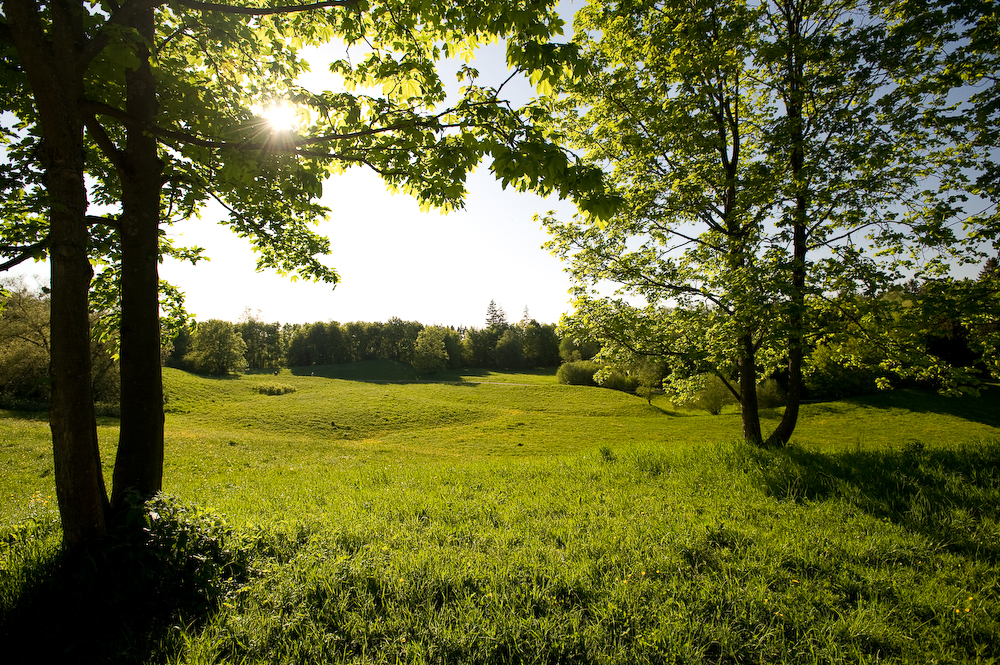 Aubinger Lohe, Puchheim, 48° 10' N, 11° 24' O